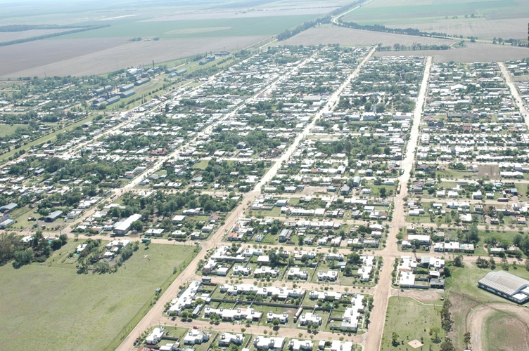 Jovita, vista aérea del pueblo